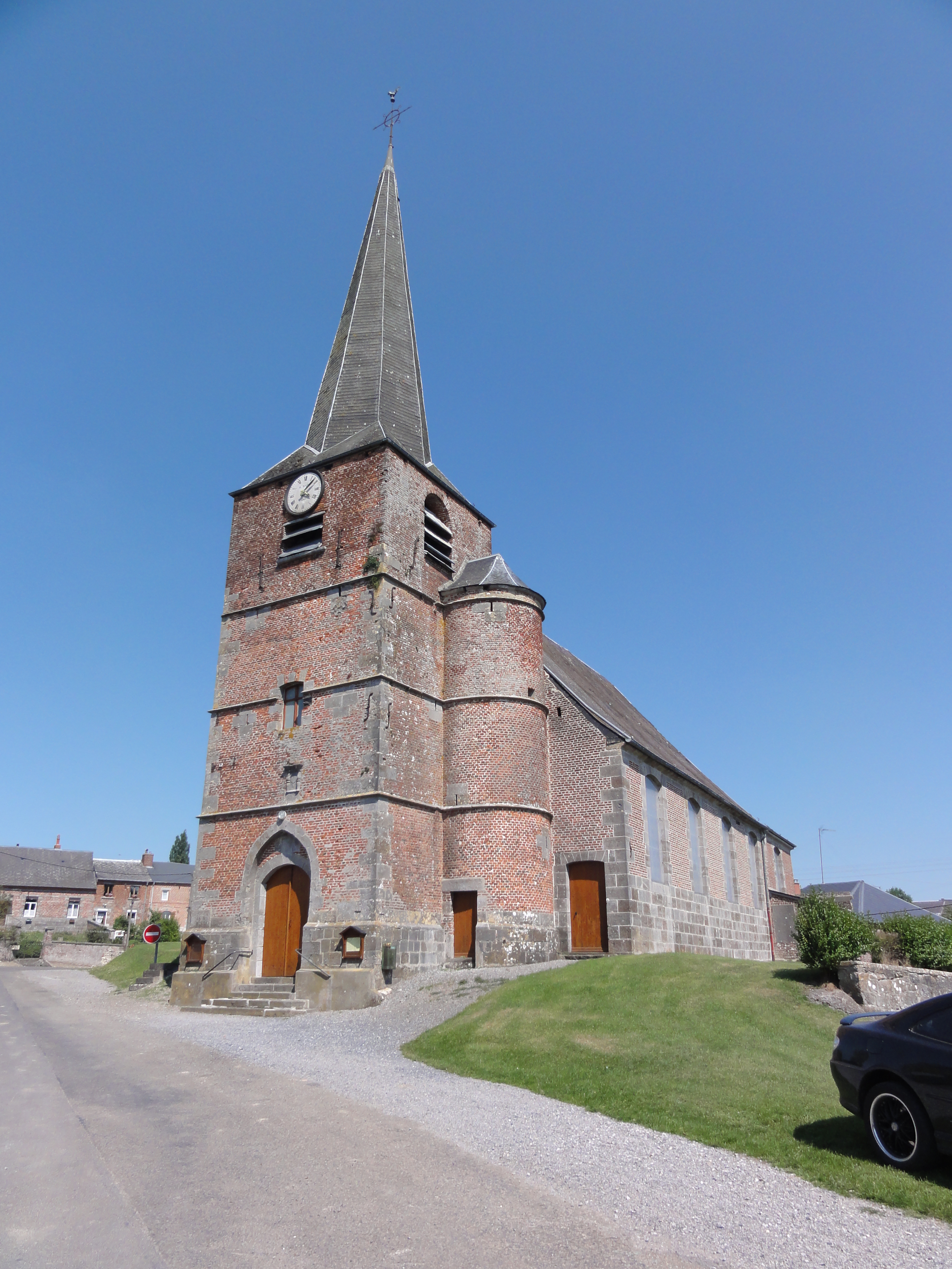 Floyon (Nord, Fr) église